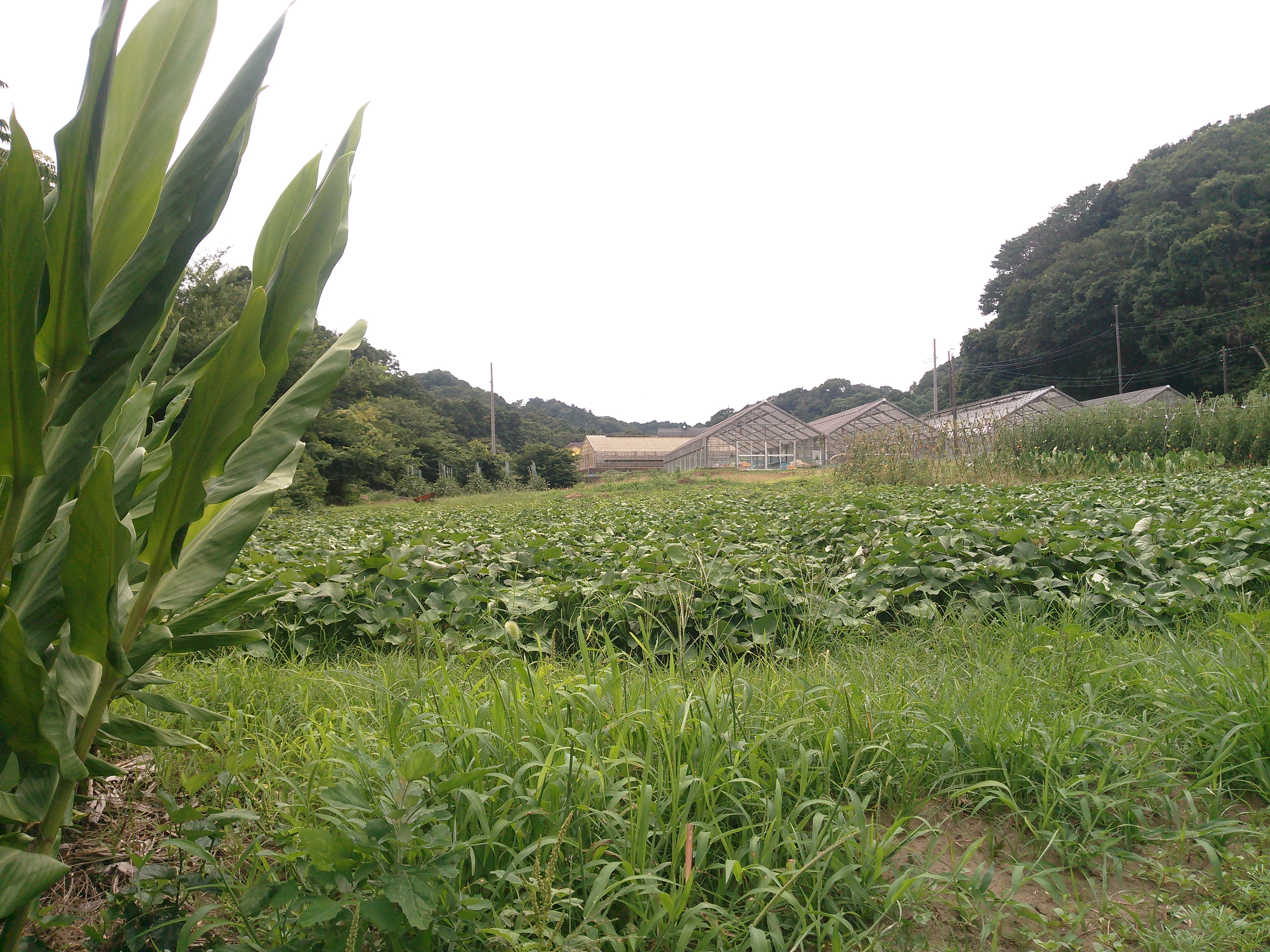 横浜市磯子区氷取沢町の、氷取沢農業専用地区。公道より撮影。